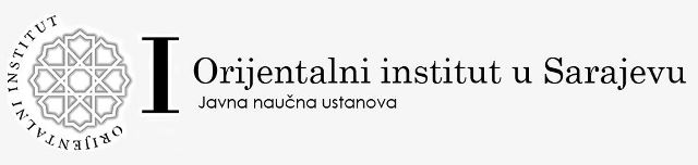 Logo Orijentalnog instituta u Sarajevu